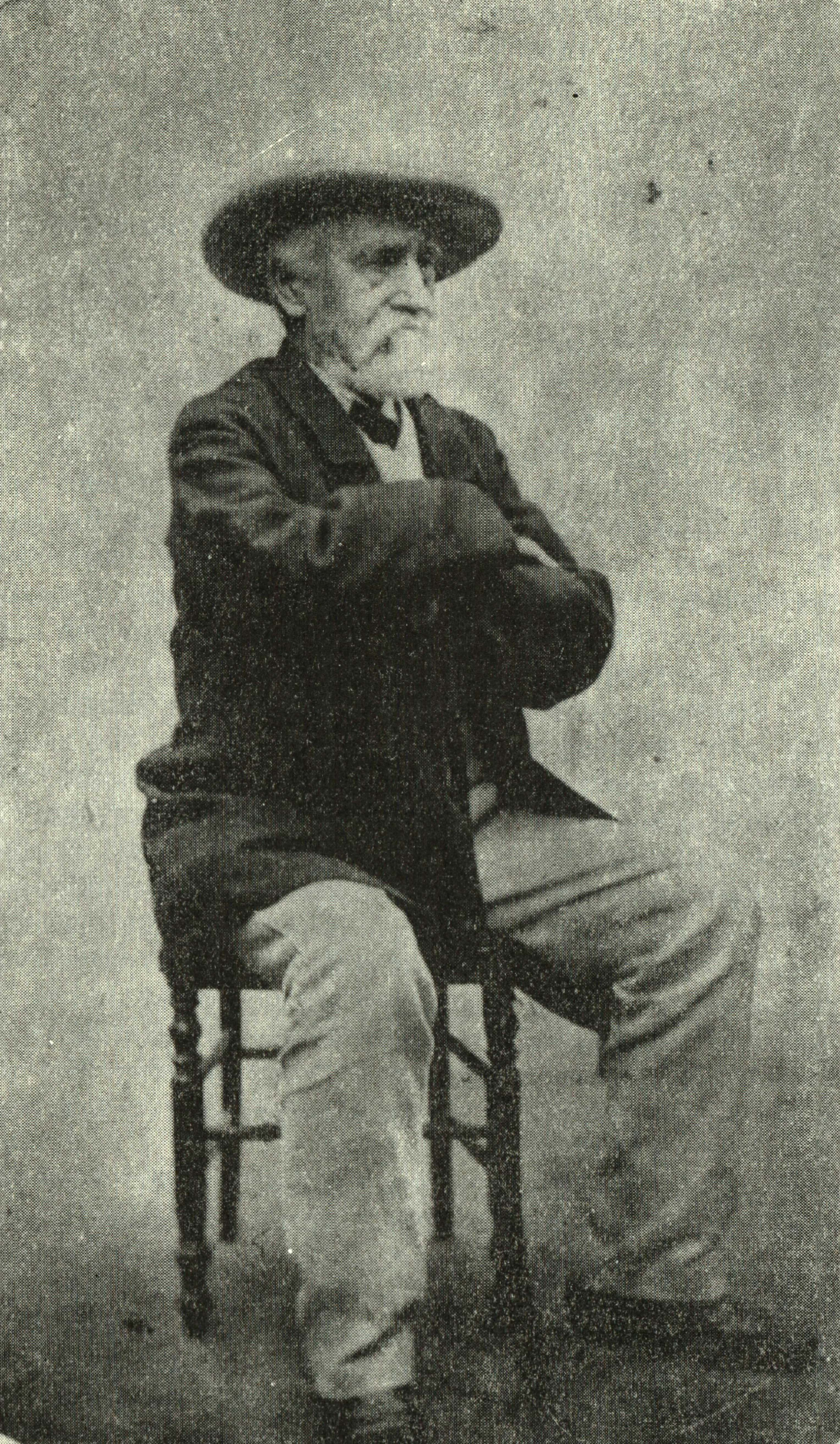 Jan Bartkowski (1811-1893)